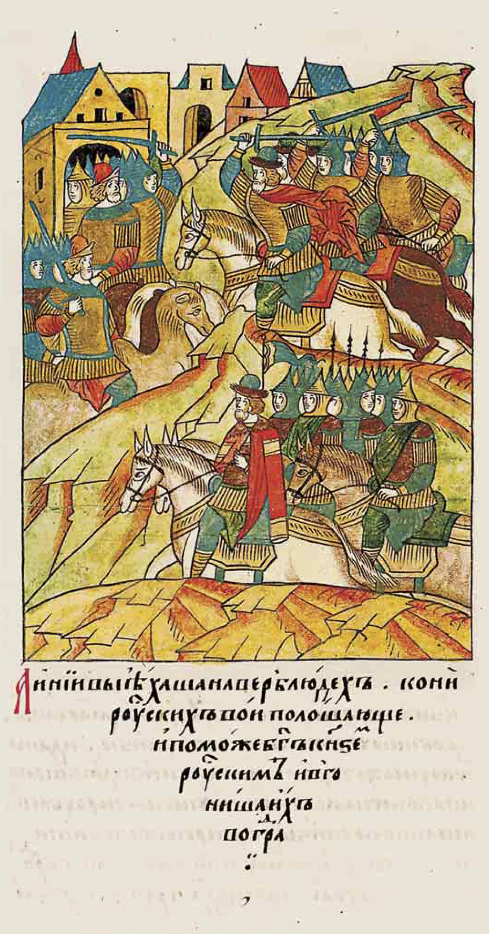 ЛИЦЕВОЙ ЛЕТОПИСНЫЙ СВОД [В ту же зиму великий князь Дмитрий Константинович Суздальский послал своих детей, князя Василия и князя Ивана, на болгар, то есть на Казань, а великий князь Дмитрий Иванович Московский прислал своего воеводу князя Дмитрия Михайловича Волынского, подошли они к Казани месяца марта в 16 день. Казанцы же вышли из города им навстречу, стреляя из луков и самострелов, а инии гром пущающе з града, страшаще русское воиньство, ]а некоторые выехали на верблюдах, кони же русских всадников испугались верблюдов. Но помог Бог русским князьям, и вогнали их обратно в город.